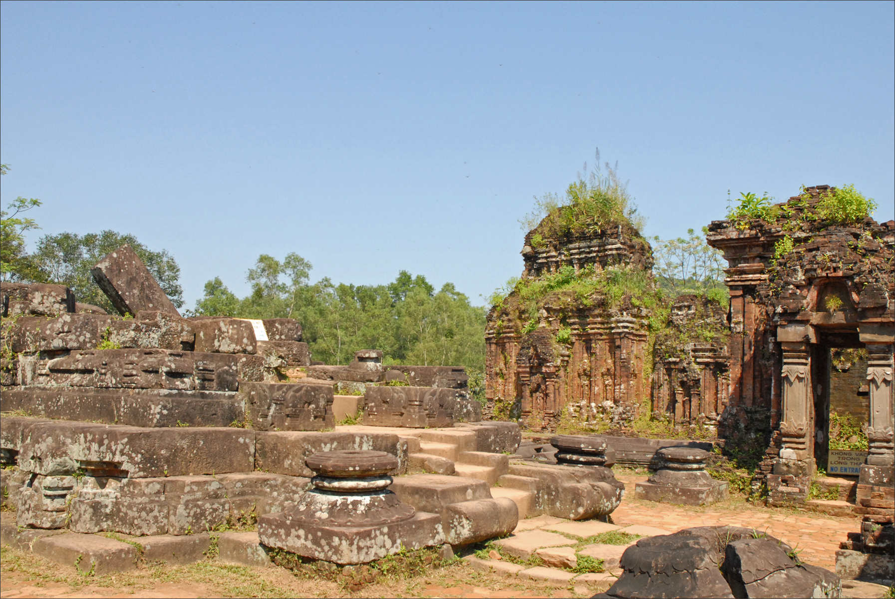 Le sanctuaire principal (kalan) - groupes B, C, D Au centre, l'édifice B1 Le site de My Son se situe à une trentaine de kilomètres de la ville de Hoi An au centre du Vietnam. Il s'agit de l'un des lieux les plus importants de l'ancien royaume Champa. Le site a été étudié par des scientifiques de l'Ecole Française d'Extrême Orient (EFEO) : Henri Parmentier (1871-1949) et ses successeurs. Bien que très endommagé, My Son, construit à partir du 7ème siècle, demeure un site historique, classé au patrimoine mondial par l'UNESCO. Ce site, sacré pour les Cham, comprend environ 70 ouvrages architecturaux de briques et de pierres au cœur d'une nature foisonnante. Ces édifices étaient tous ornés de frises sculptées et autres décors, propres à l’art Cham. Les oeuvres majeures sont présentées au musée Cham de Da Nang. L'objet de culte dans les temples principaux de My Son est le linga, symbole de Shiva - protecteur des rois Cham. Le site, proche de la piste Ho Chi Minh, a été en grande partie détruit par des bombardements américains durant la guerre. voir les photos du site prises au début du 20ème siècle